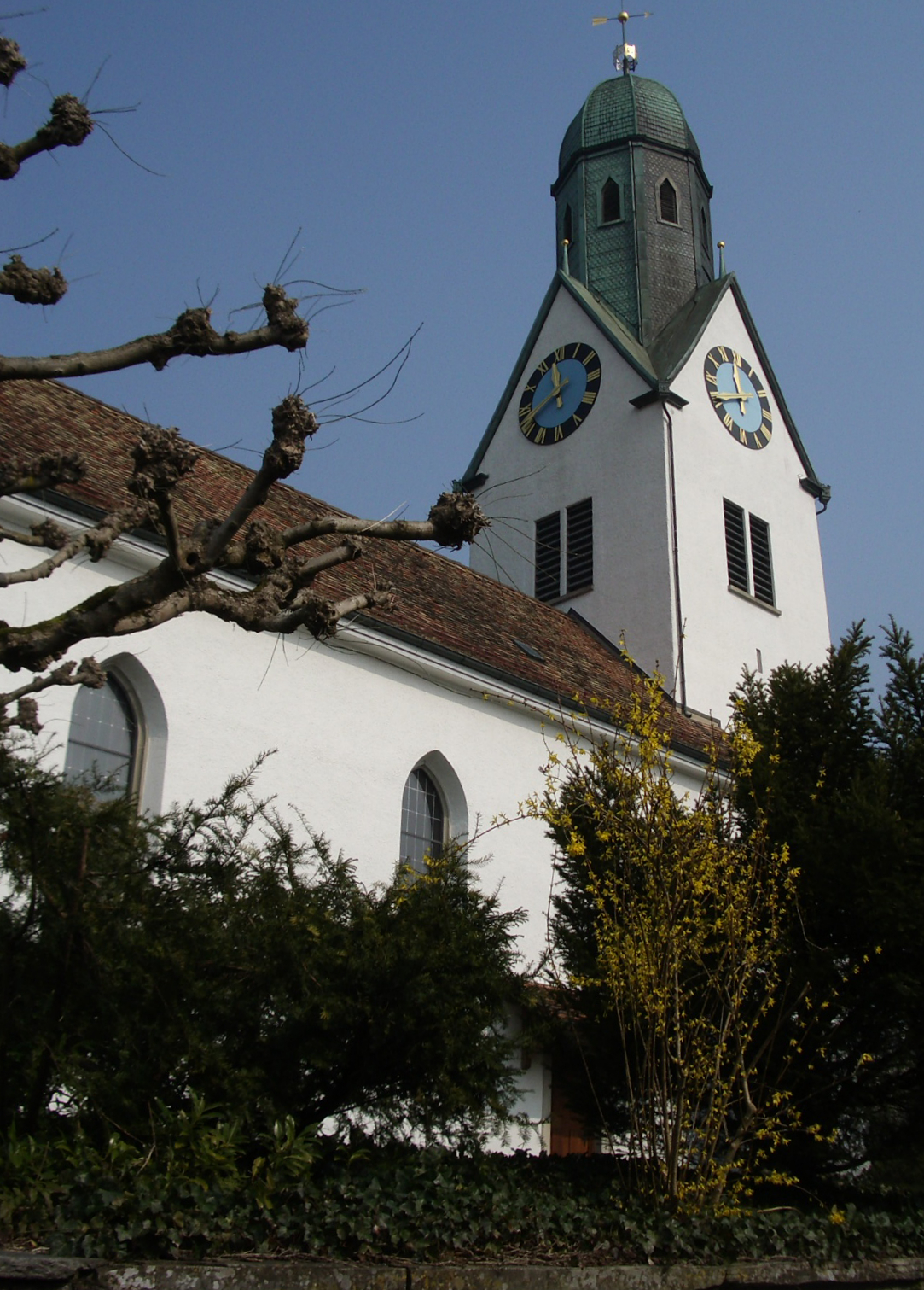 Otelfingen ZH, Switzerland self-made, March 2007